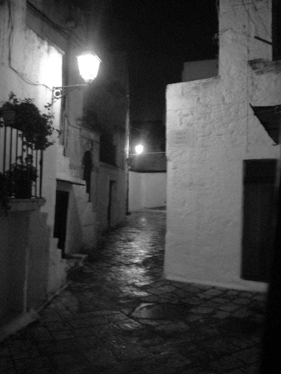 foto non professionali e assolutamente di pubblico dominio da me fatte in data 01/01/06